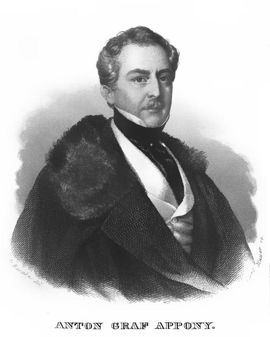 Anton Graf Apponyi (1782-1852), Ritter des Goldenen Vließ, Österreichischer Botschafter am französischen Hof